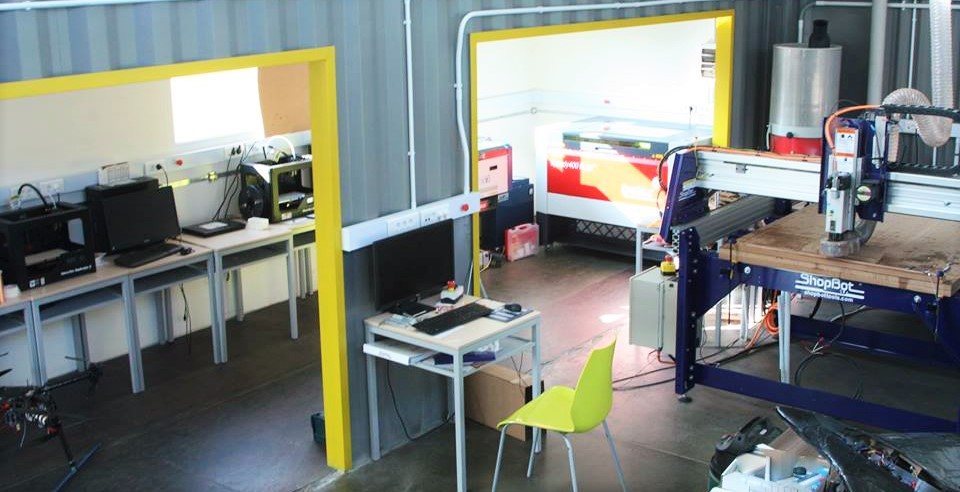 Այբին կից ֆաբլաբ (ներսից)